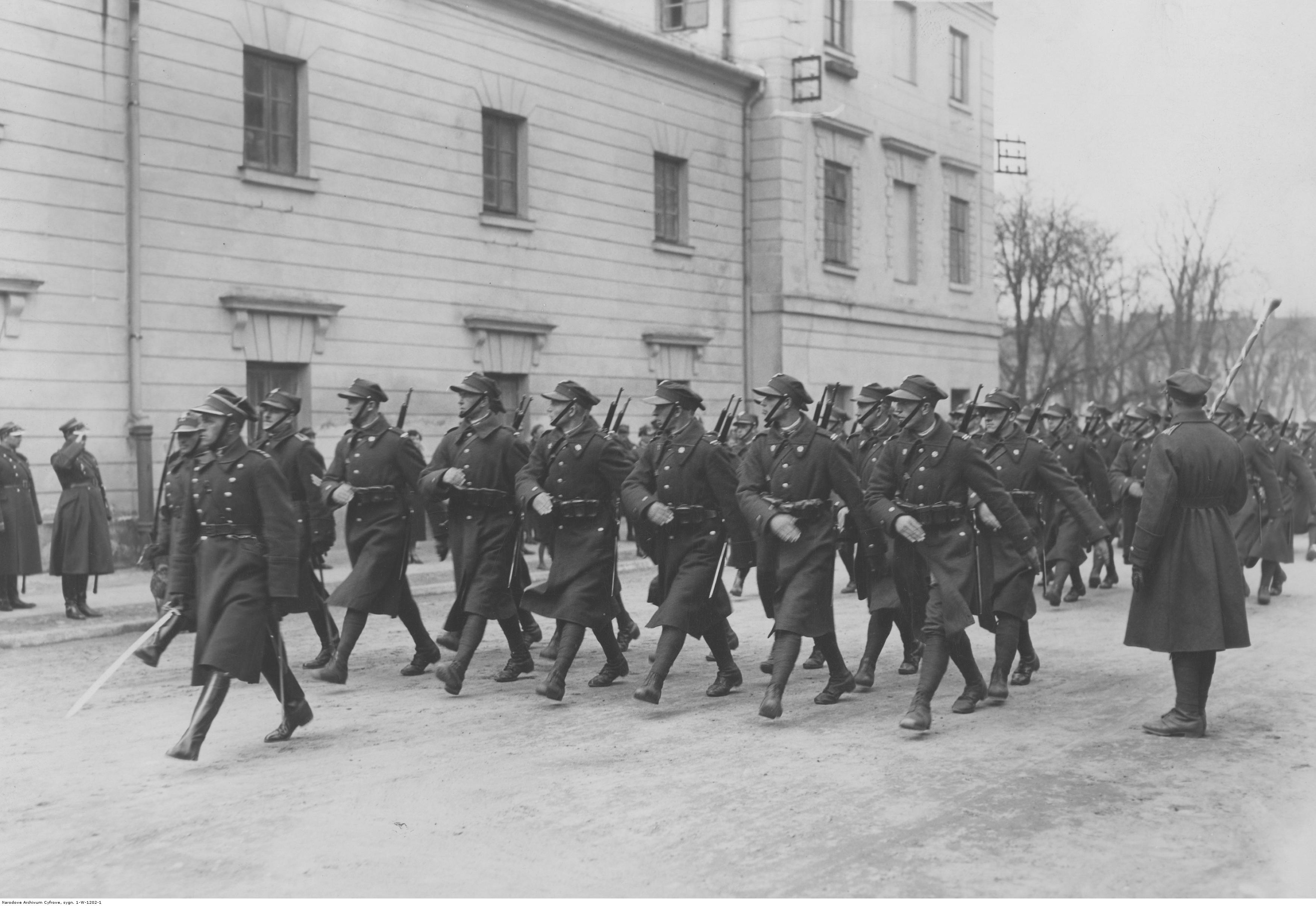 Zakończenie kursu szkoły podoficerskiej w 21 pułku piechoty w Warszawie. Defilada podoficerów na terenie Cytadeli. Koncern Ilustrowany Kurier Codzienny - Archiwum Ilustracji. Sygnatura: 1-W-1202-1